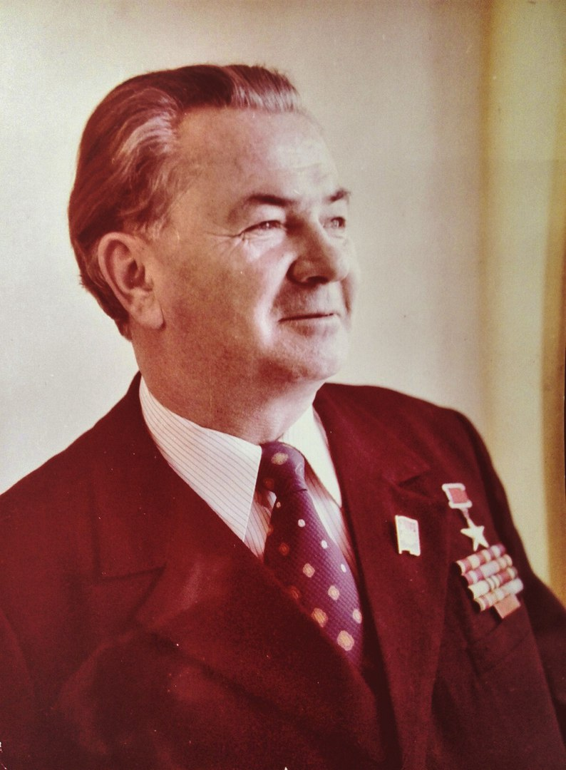 Фото Луговского В Д председателя колхоза «Дружба»